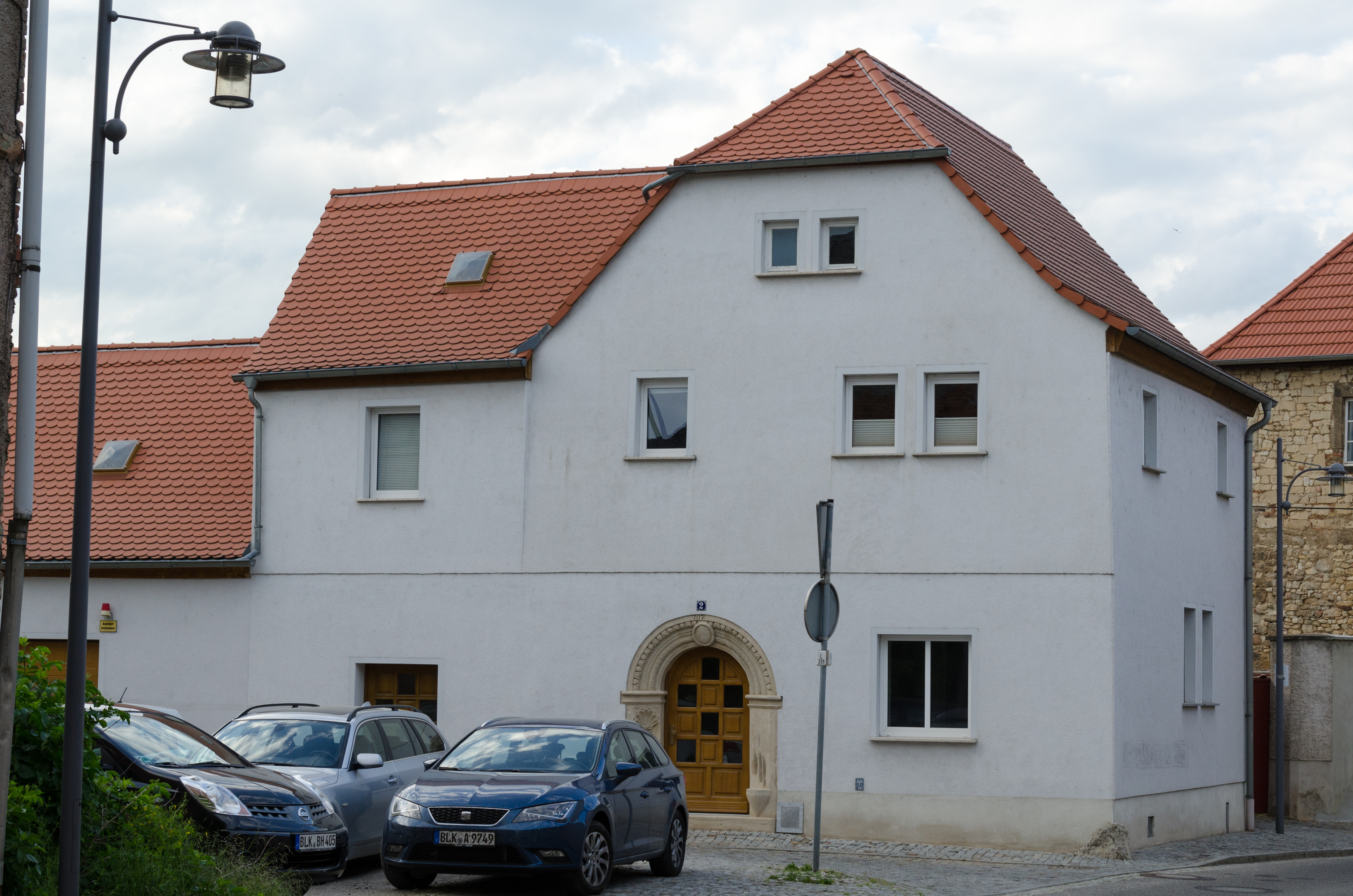 Laucha an der Unstrut, Kleine Salzstraße 2